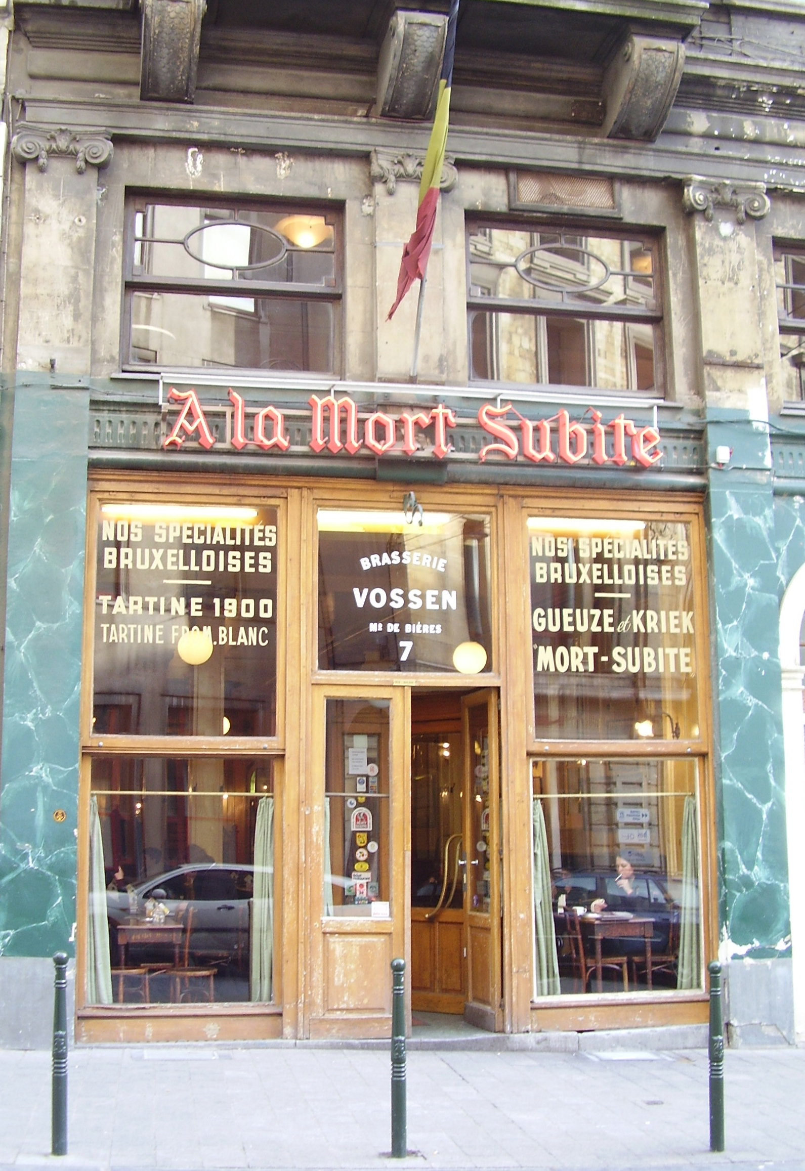 À la Mort Subite, bistrot bruxellois 1928 - Belgique